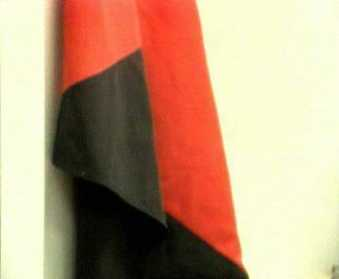 Bandera del Frente Sandinista de Liberación Nacional (FSLN) de Nicaragua, América Central.